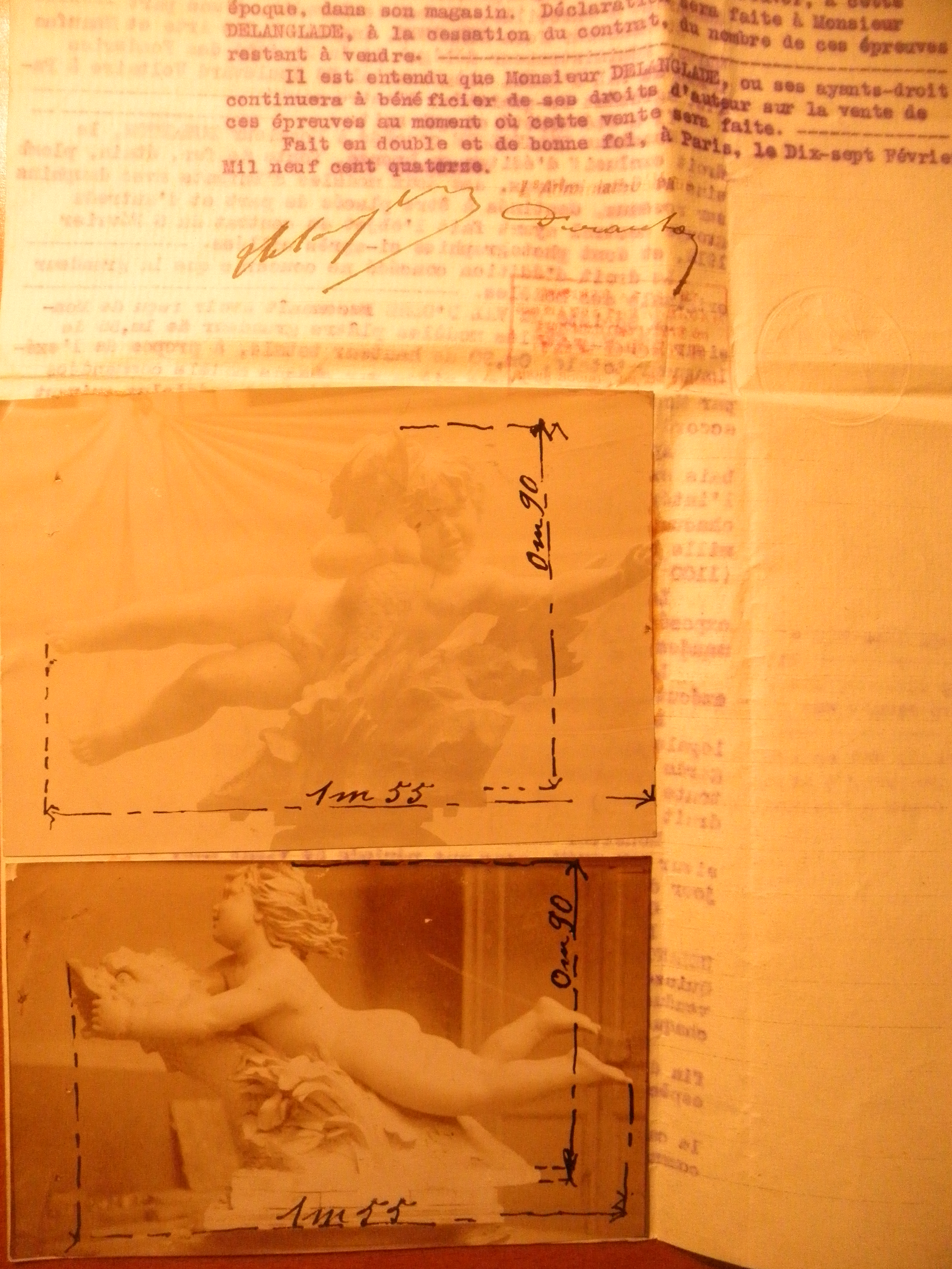 1910 contrat Bonnasse Val d'Osne